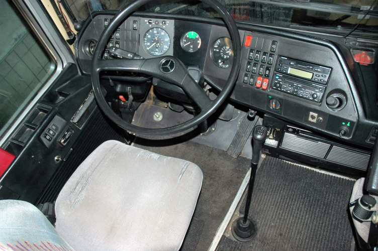 Fahrerplatz eines Mercedes-Benz O 303 Reisebusses (ab 1982)